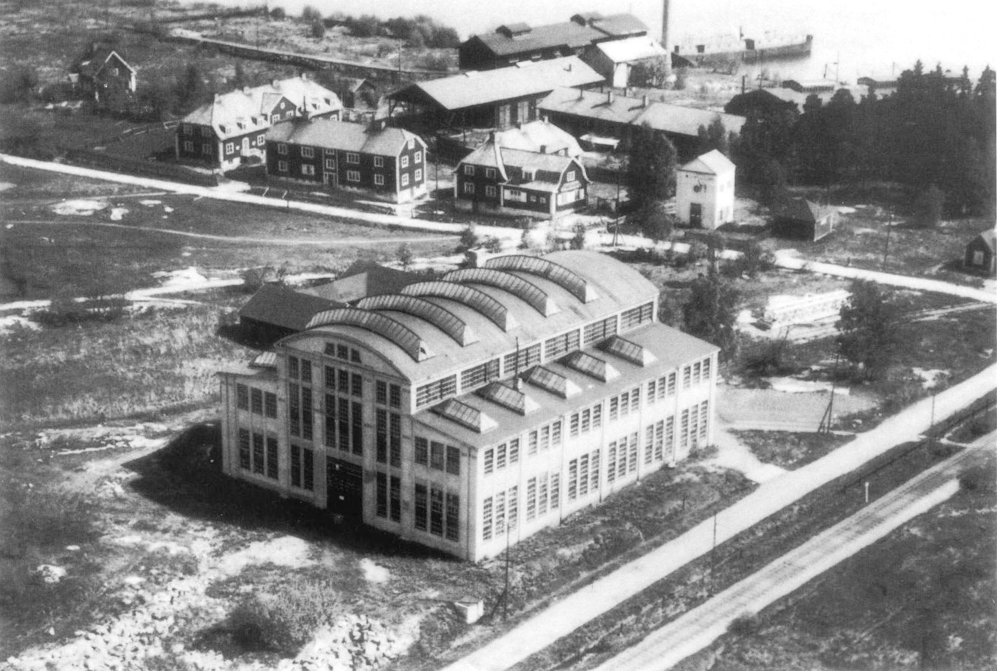 Fredrik and Birger Ljungströms ångturbinsfabrik i Gåshaga på Lidingö uppförd 1918. I fabriken tillverkade man de första prototyperna till koleldade ångturbindrivna lokomotiv som ersättning för konventionella koleldade kolvångmaskinsdrivna lokomotiv. Bostadshusen i övre delen av bilden var arbetarbostäder som uppfördes 1915-18 av Olaus Olssons Kolimport & Varv. Vissa av dessa har bevarats och byggdes om till bostadsrättslägenheter när Gåshaga bostadsområde uppfördes med början år 2000.